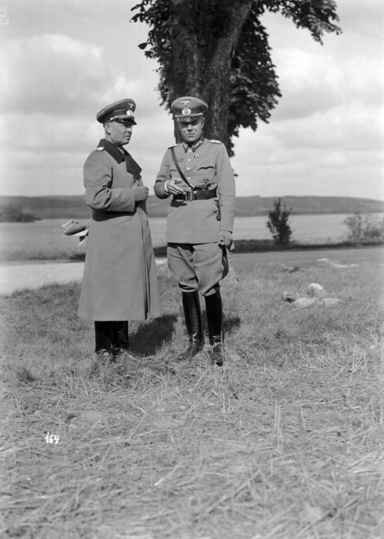 Wehrmachtmanöver 1937 in Mecklenburg und Pommern Die beiden großen Gegenspieler Hitlers: Der Oberbefehlshaber des Heeres, Generaloberst Frhr. von Fritsch, der den Soldatentod sucht und 1939 vor Warschau fand, und sein Generalstabschef General der Artill. Beck, erschossen 20. Juli 44. [Titel später zugefügt]